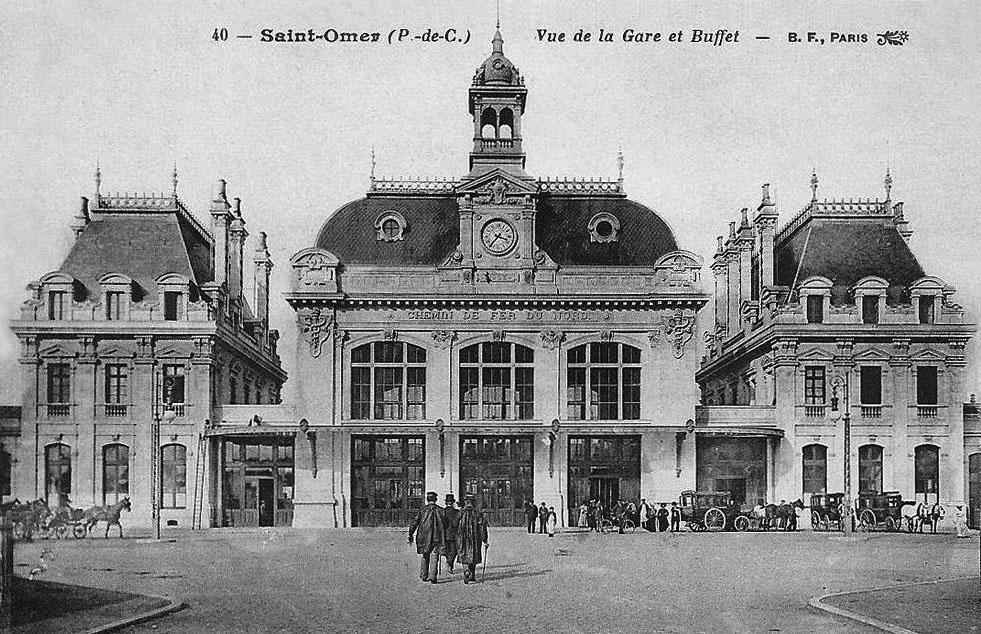 Le bâtiment voyageurs de la gare de Saint-Omer construit à partir de 1902 et inauguré en 1904, photographié avant 1910.